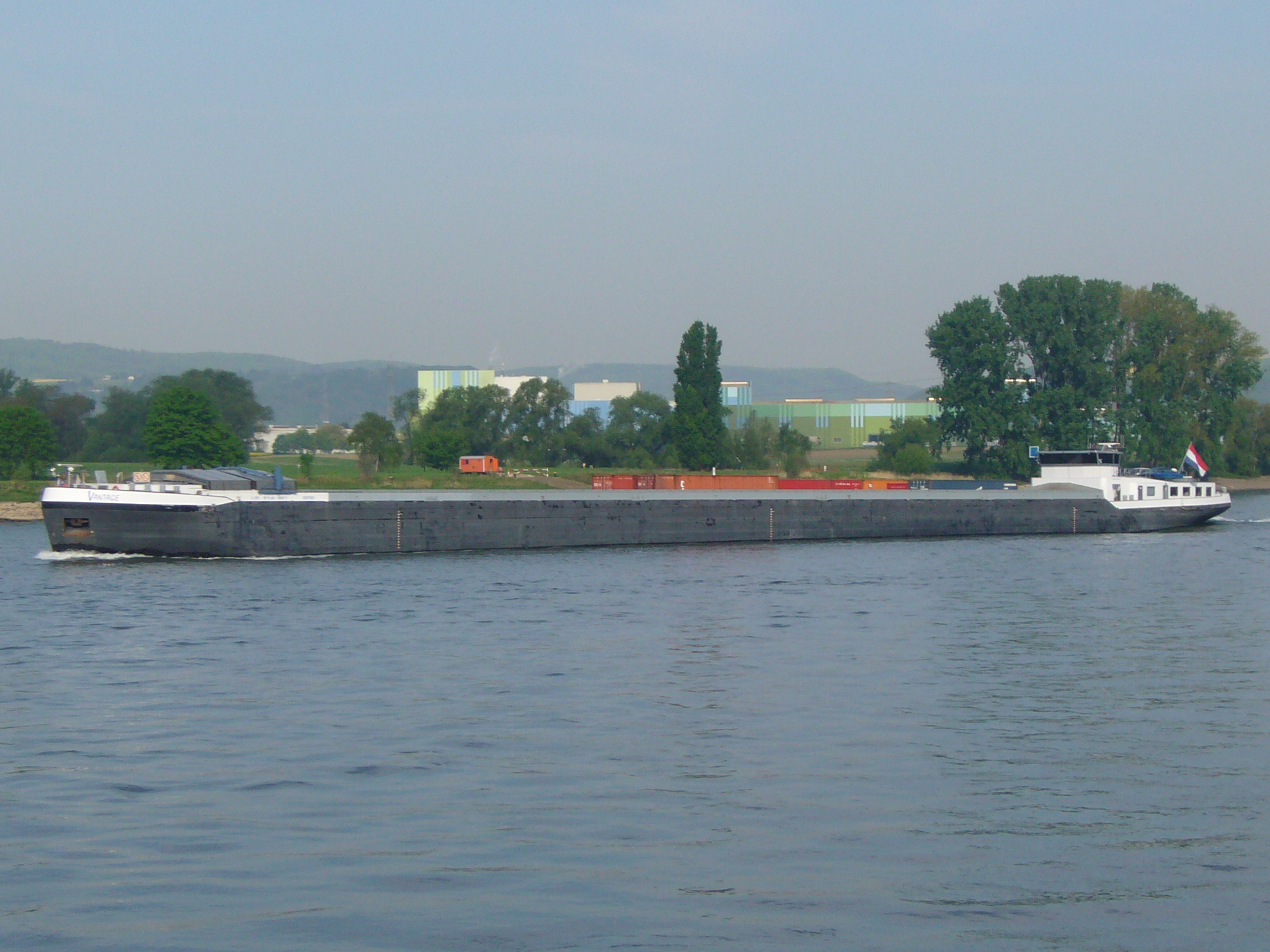 Motorschiff Vantage